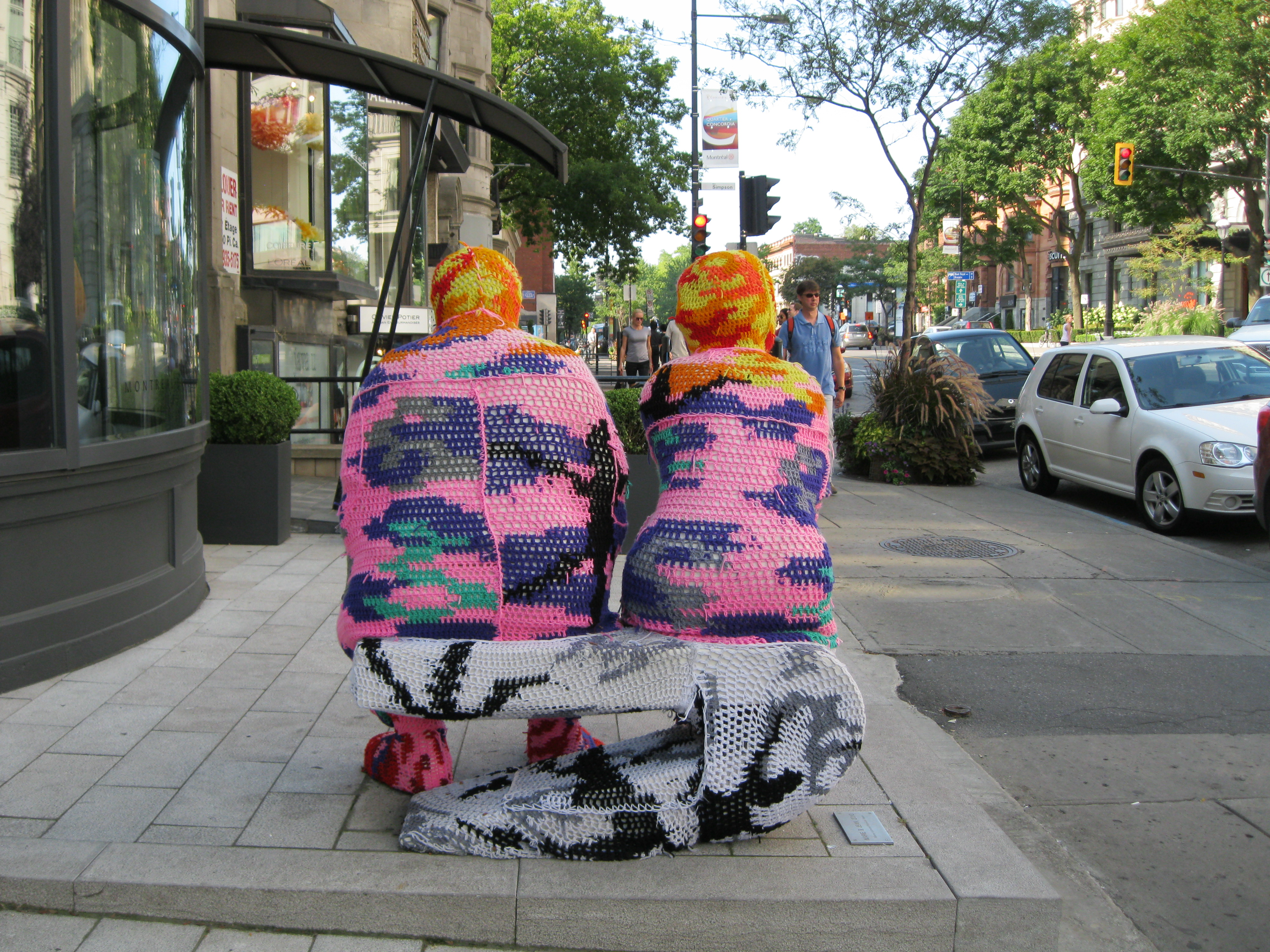 Devant la galerie NuEdge de la rue Sherbrooke à Montréal, l'artiste d'origine polonaise Olek (Agata Oleksiak) a crocheté une oeuvre sur une sculpture existante. Son art consiste à ajouter une seconde peau, très colorée; ce qui modifie radicalement l'apparence de l'objet. Montreal Gazette